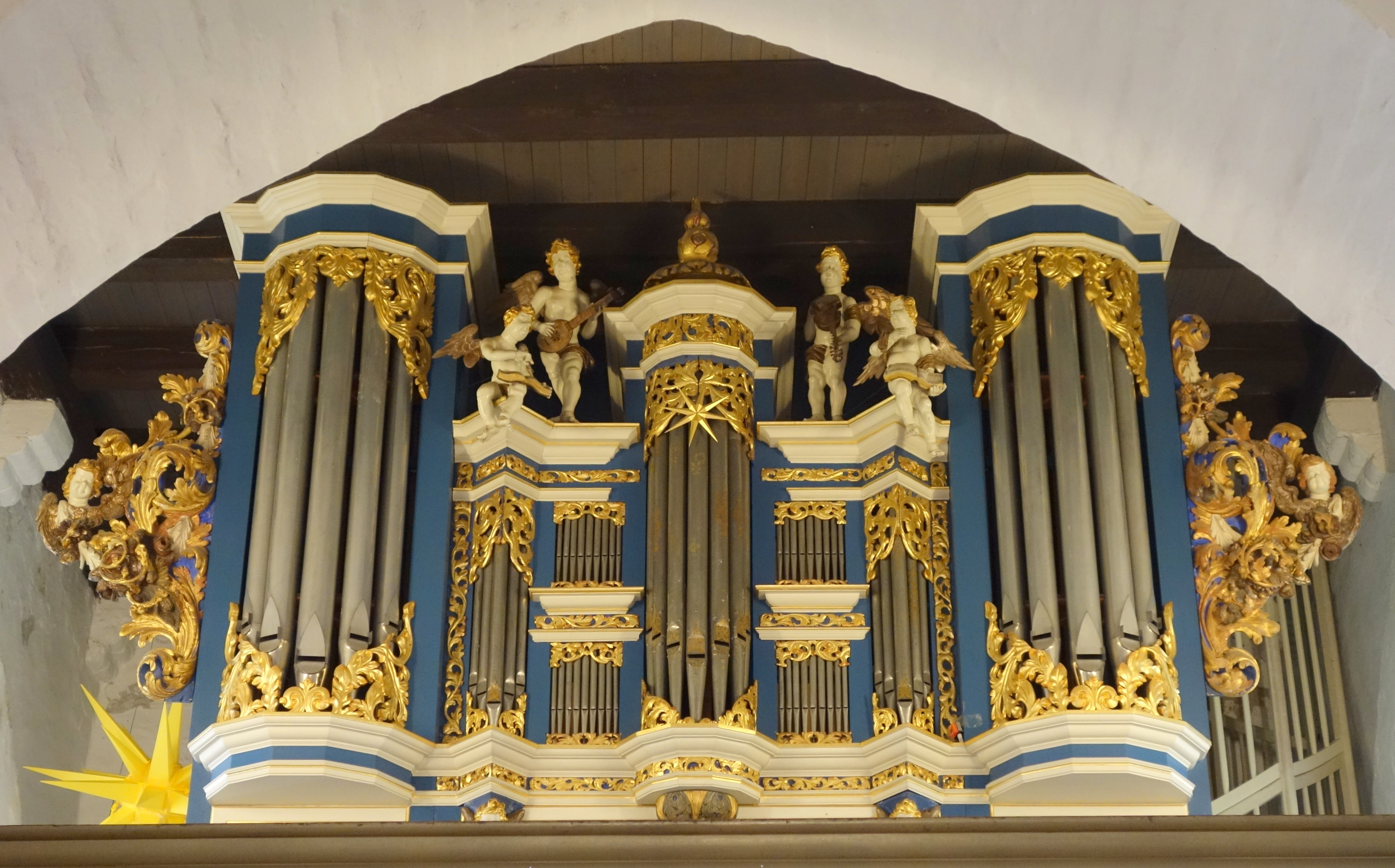 Dorfkirche Zarpen, Kreis Stormarn, Schleswig-Holstein, Deutschland